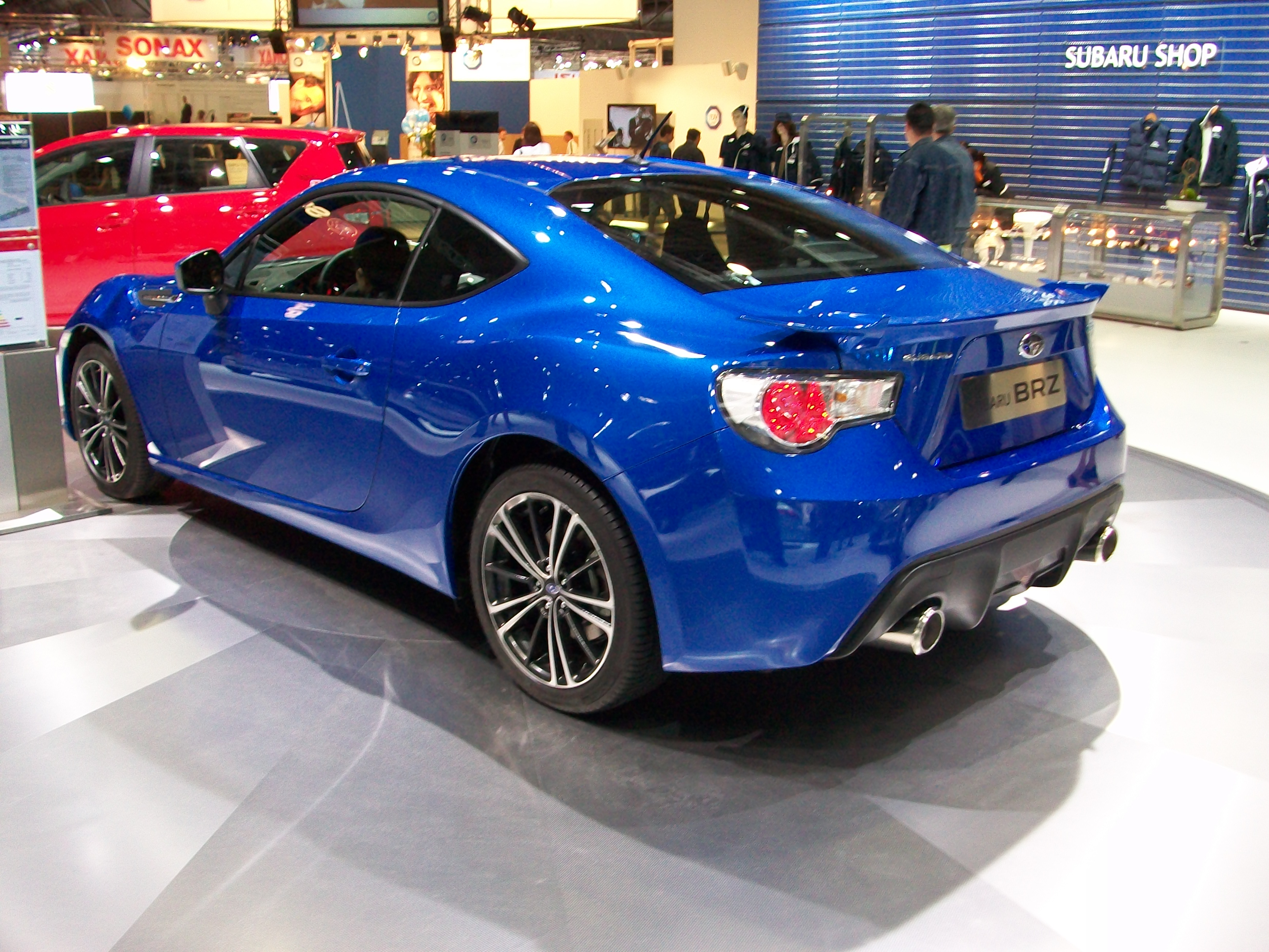 Der Subaru BRZ auf der AMI 2012